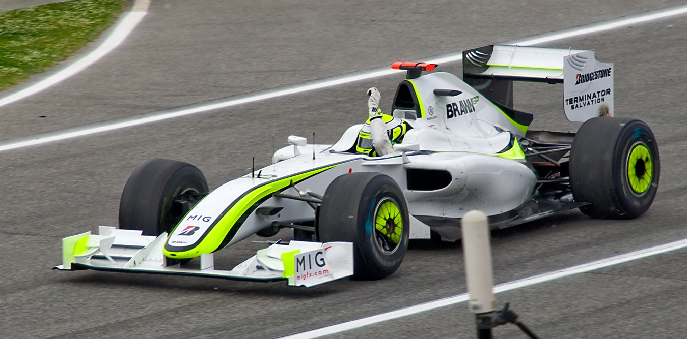 Nikon D90 + Sigma 18-200 DC OS HSM 1/500s - F/10 - 200mm - ISO400